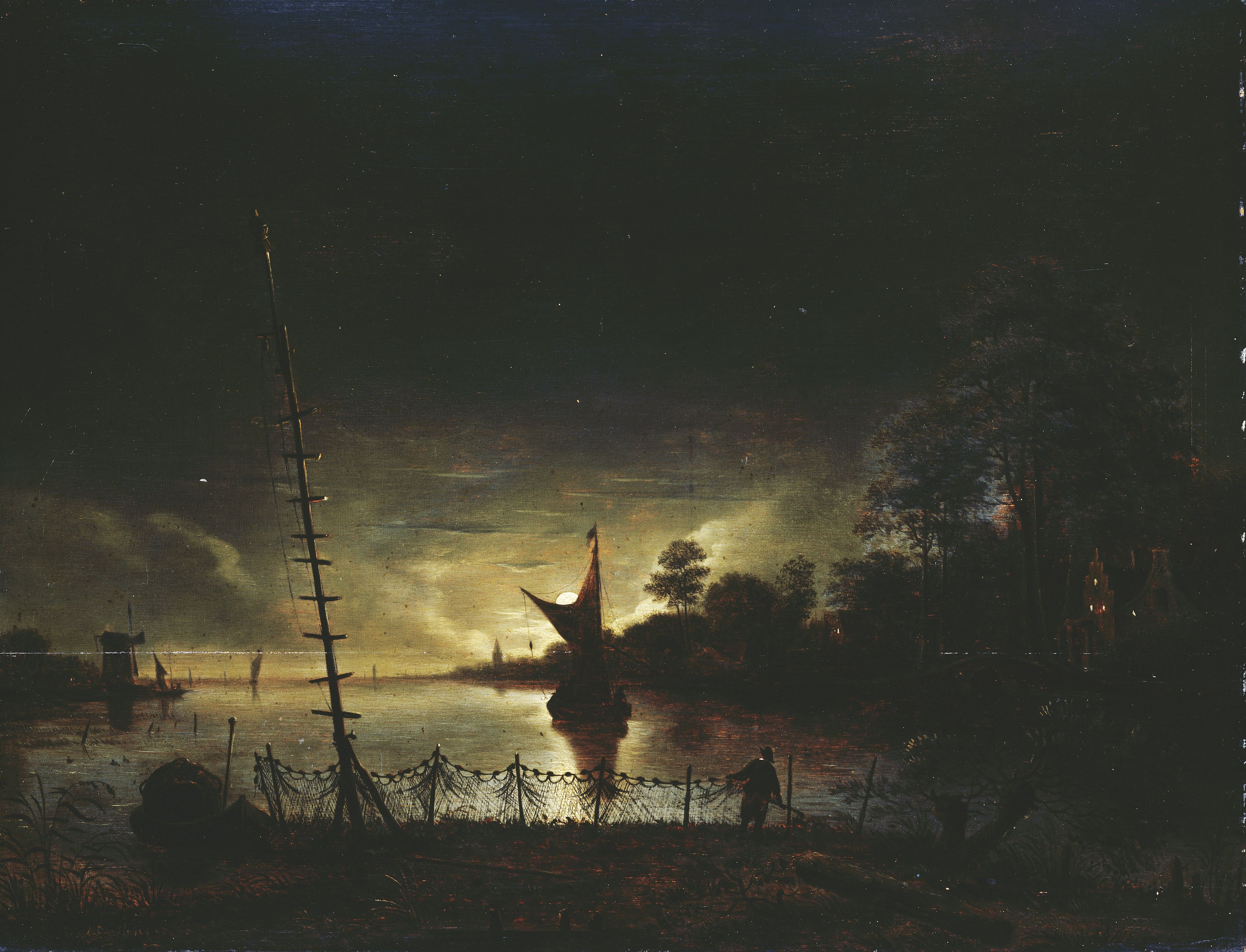 Rivierlandschap bij maanlicht. Op de voorgrond een baken en vissers die netten te drogen hangen. Vissersboten op het water.